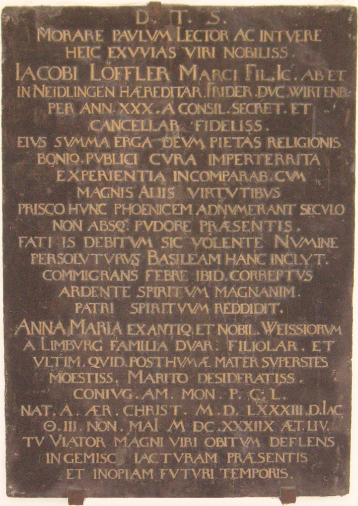 Epitaph des württembergischen Reichskanzlers Jakob Löffler im Kreuzgang des Basler Münsters.